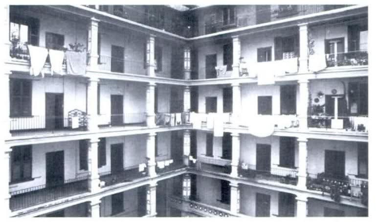 Tipica casa a corte di via Jacopo Dal Verme, all'Isola.